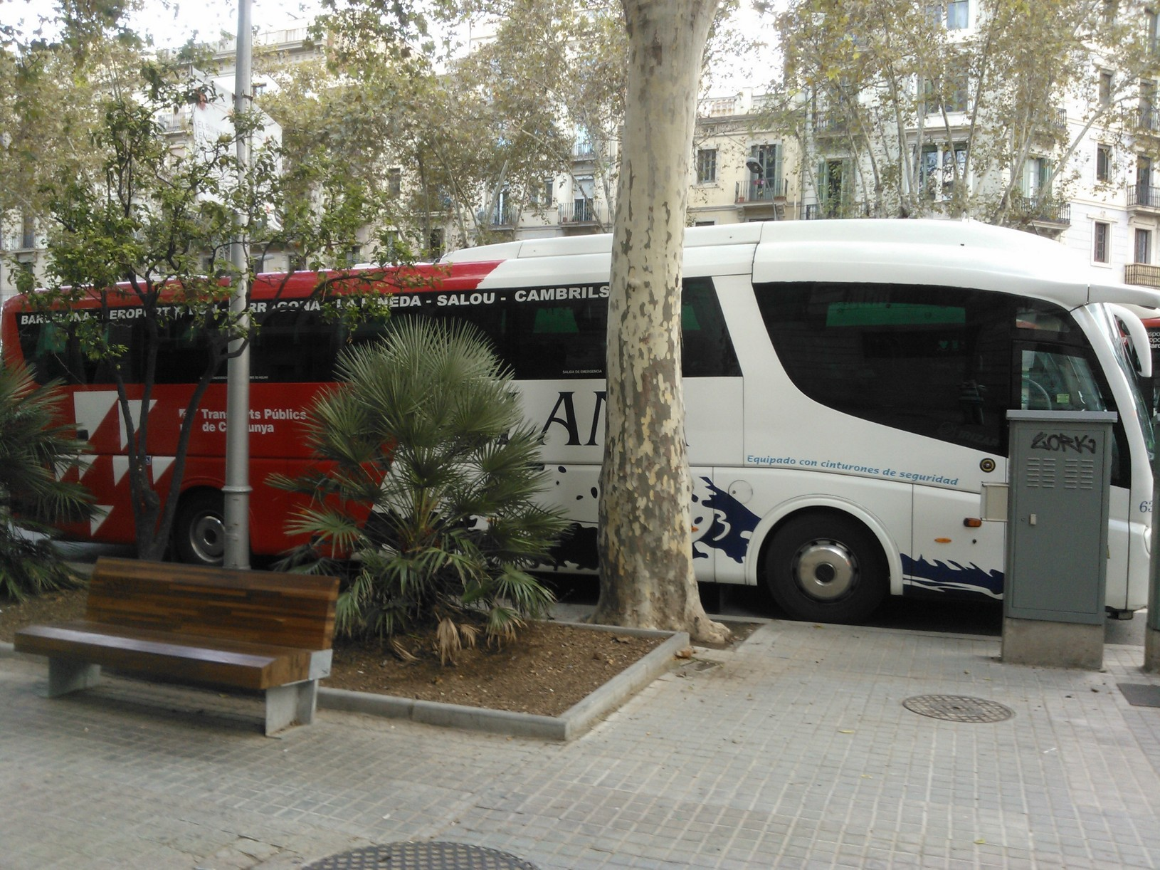 Autobús interurbà a Barcelona